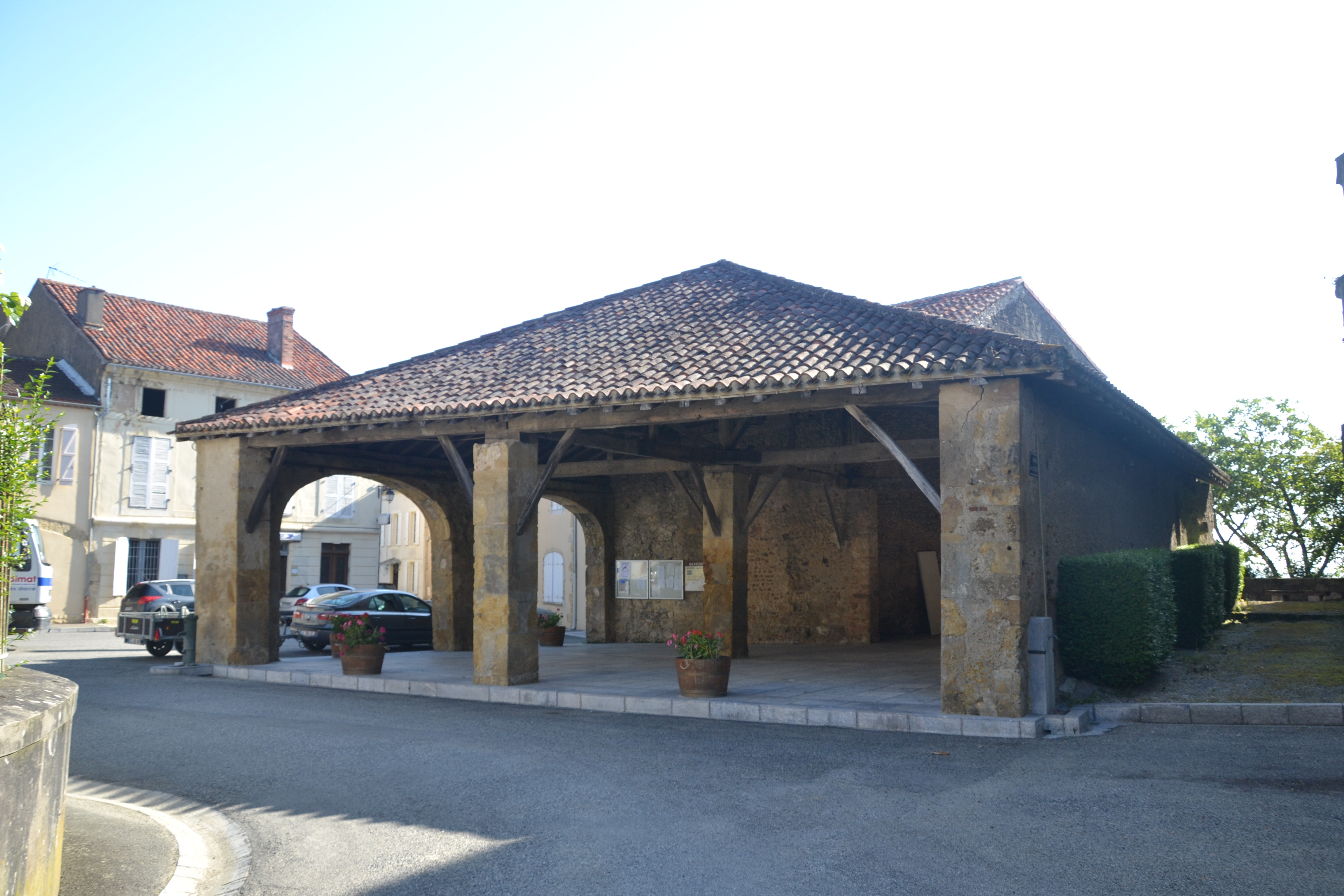 halles de Castelnau-Rivière-Basse